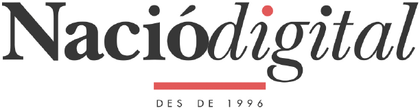 Logotip de Nació Digital